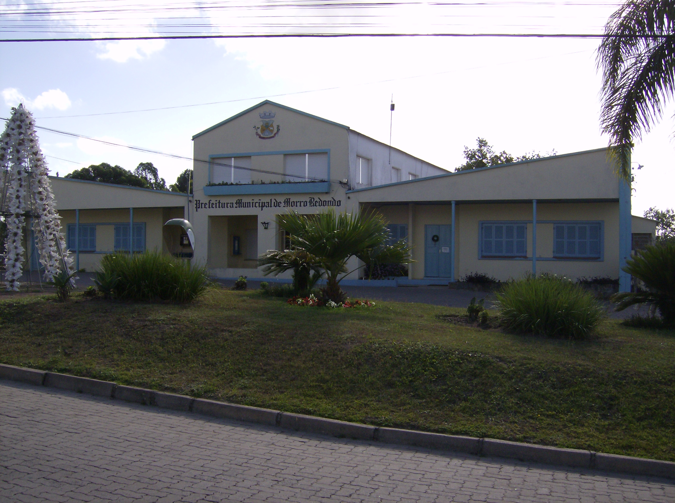 Morro Redondo (city hall), Rio Grande do Sul State, Brazil